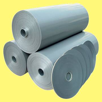 drei Mutterollen und 5 geschnittene Rollen Anodenfoile für Aluminium-Elektrolytkondensatoren